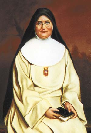 Портрет Блаженной Марии Маргариты (Лопес де Матурана).